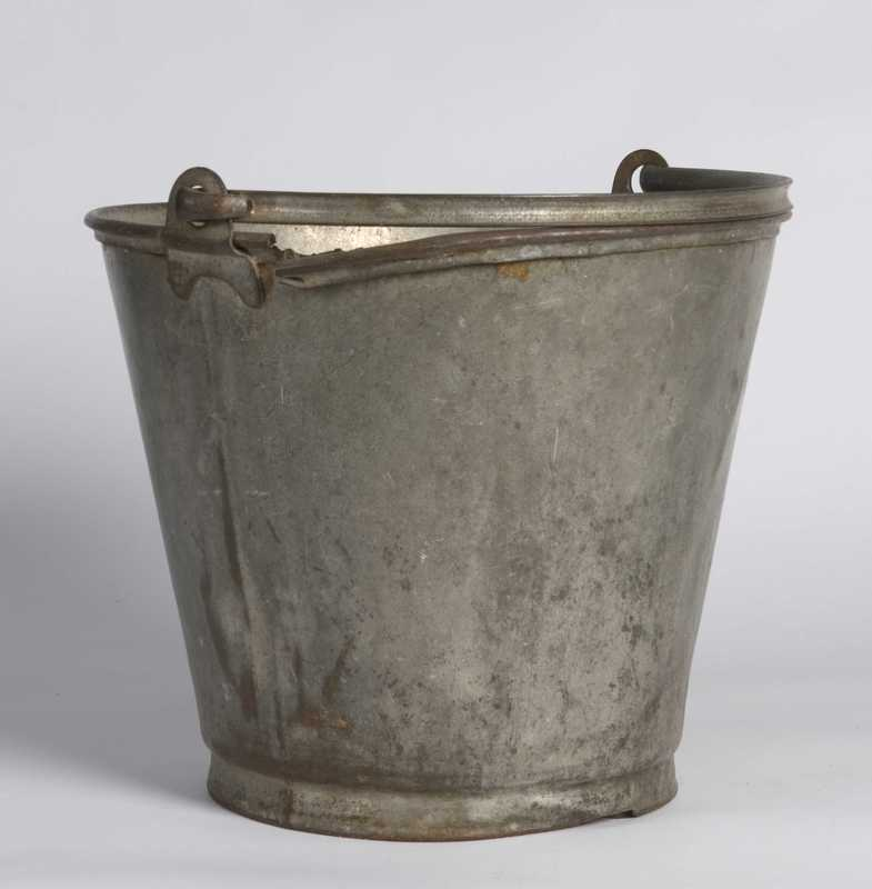 Melkebøtte av jernblikk fra ca 1920 brukt i Sogndal i Sogn og Fjordane. Foto Anne-Lise Reinsfelt / Norsk Folkemuseum NFL.26756.